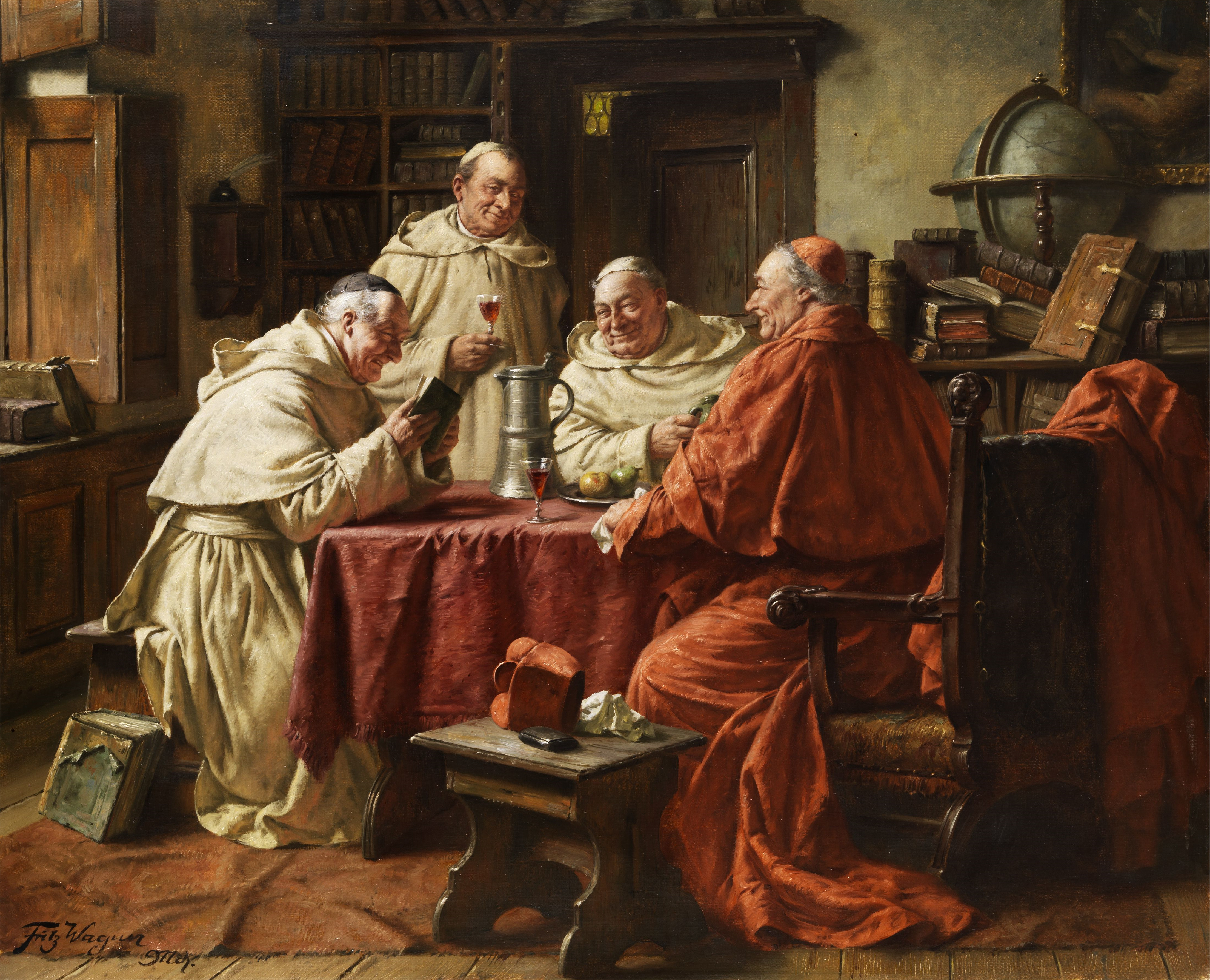 Kardinal mit Mönchen in einer Klosterbibliothek. Öl auf Leinwand. 66 x 80,5 cm.